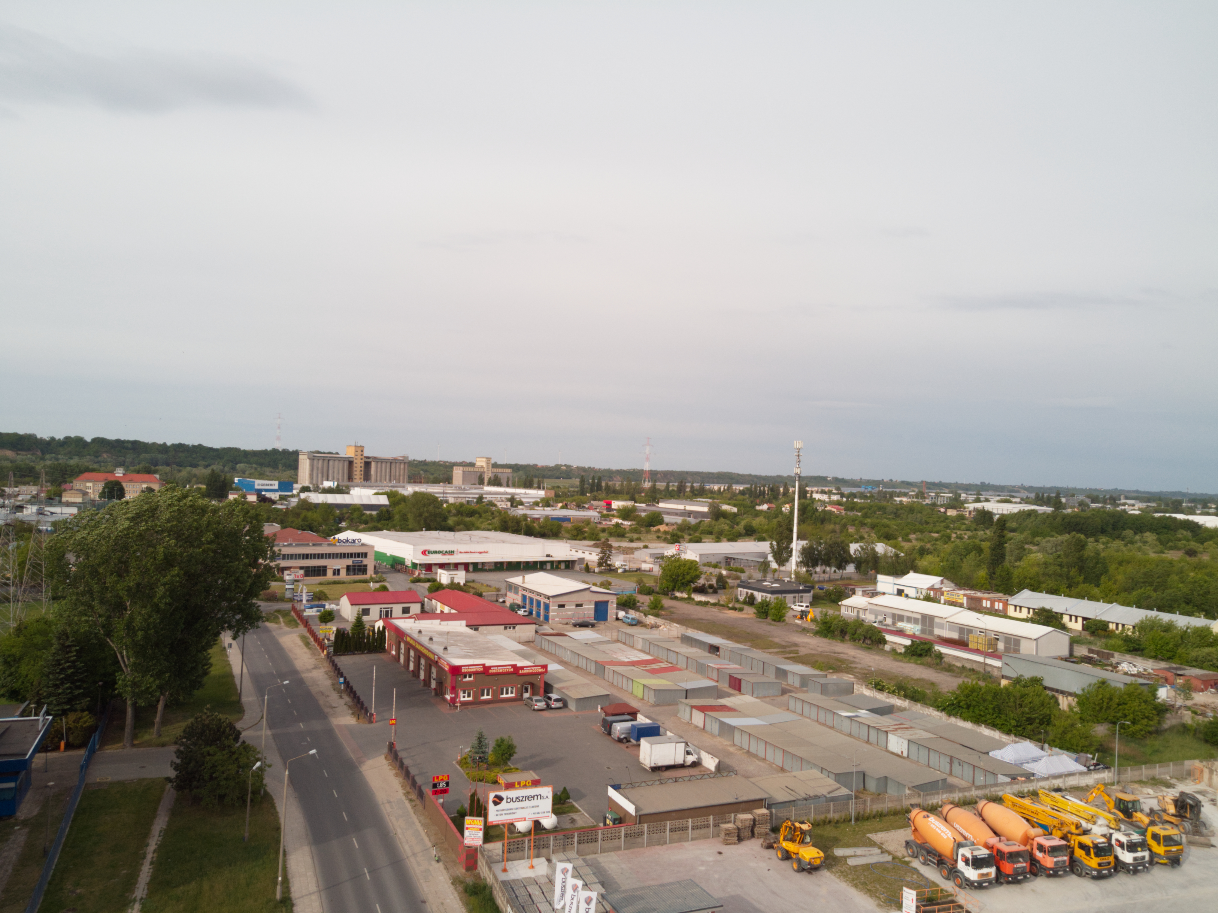 Kazimierza Wielkiego (2020 r.)